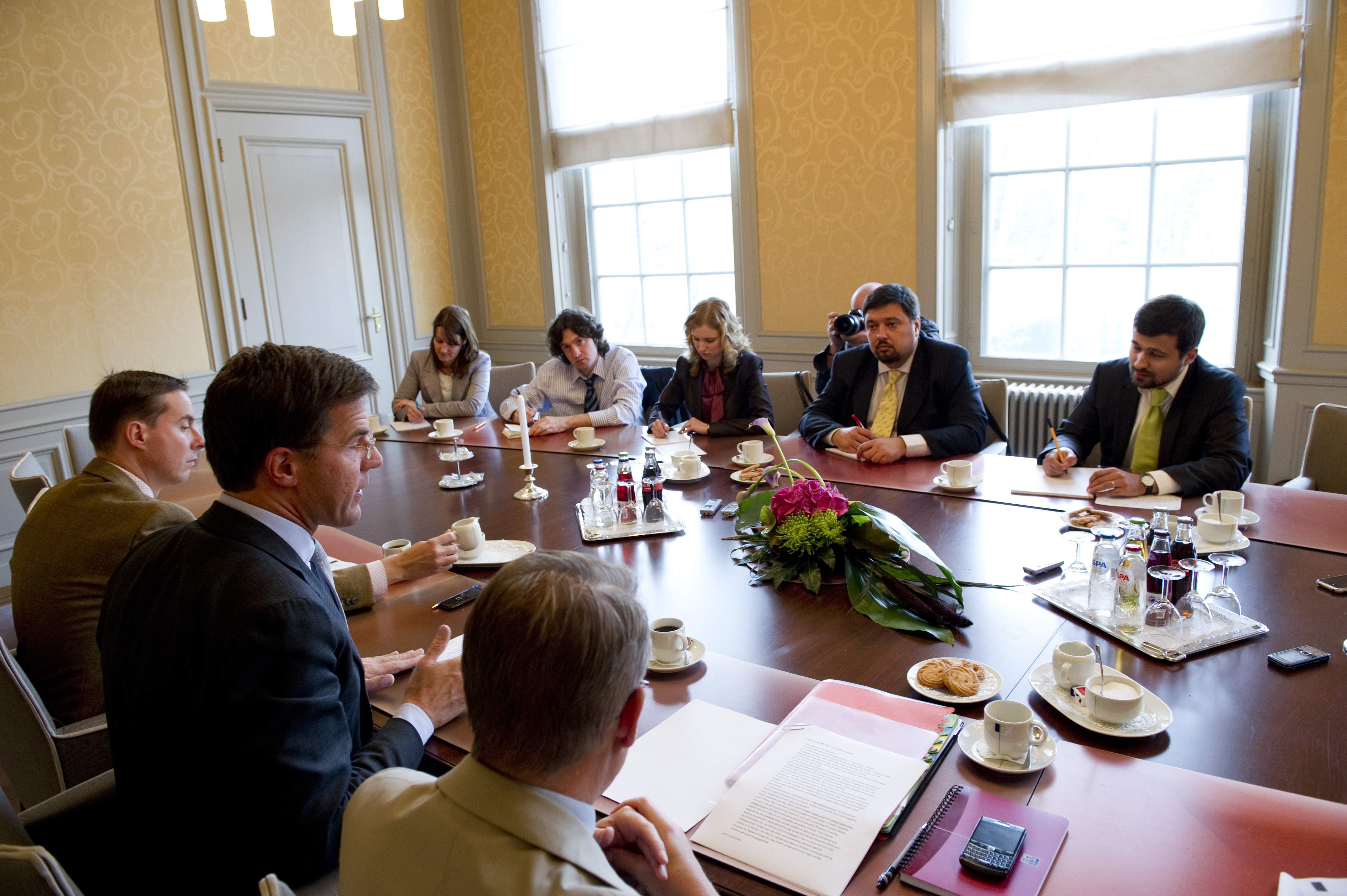 Minister-president Rutte ontvangt Russische journalisten in de Blauwe Zaal van het ministerie van Algemene zaken voor een interview over de economische missie naar Rusland. Van 19 tot en met 21 oktober brengen minister-president Rutte en minister Schultz van Haegen van Infrastructuur en Milieu een bezoek aan Rusland. Doel is onder andere om Nederlandse en Russische bedrijven met elkaar in contact te brengen en bestaande contacten te versterken. Lees hier meer